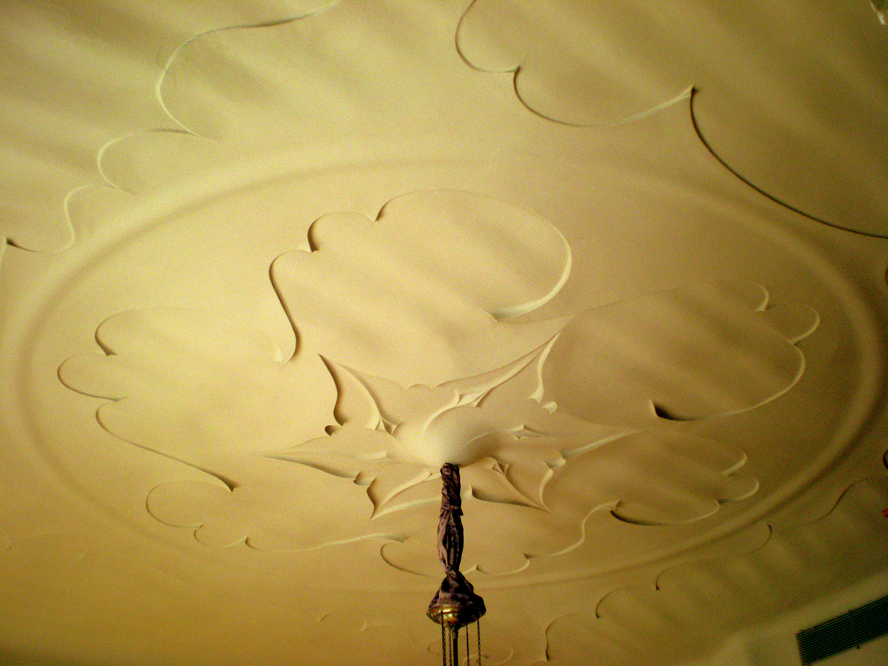 Barcelona - La Pedrera. Sostre del menjador.